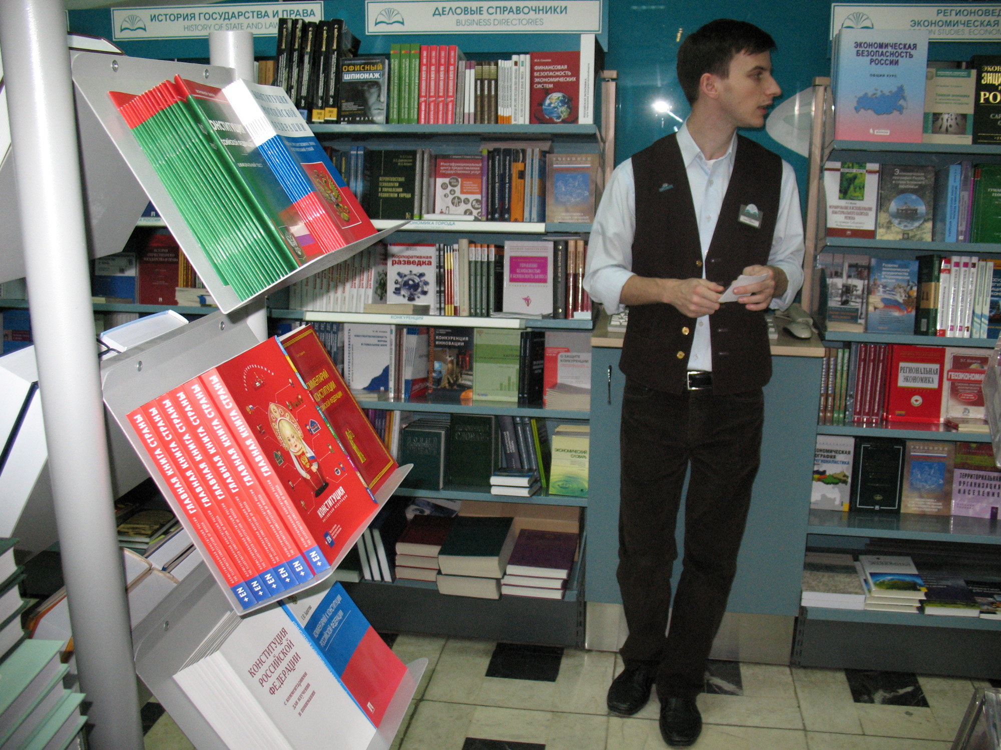 Магазин: Московский Дом Книги на Арбате. Число: 4 декабря 2012 года. Стеллаж: Государственное (конституционное) право. Продавец в фирменной одежде магазина.